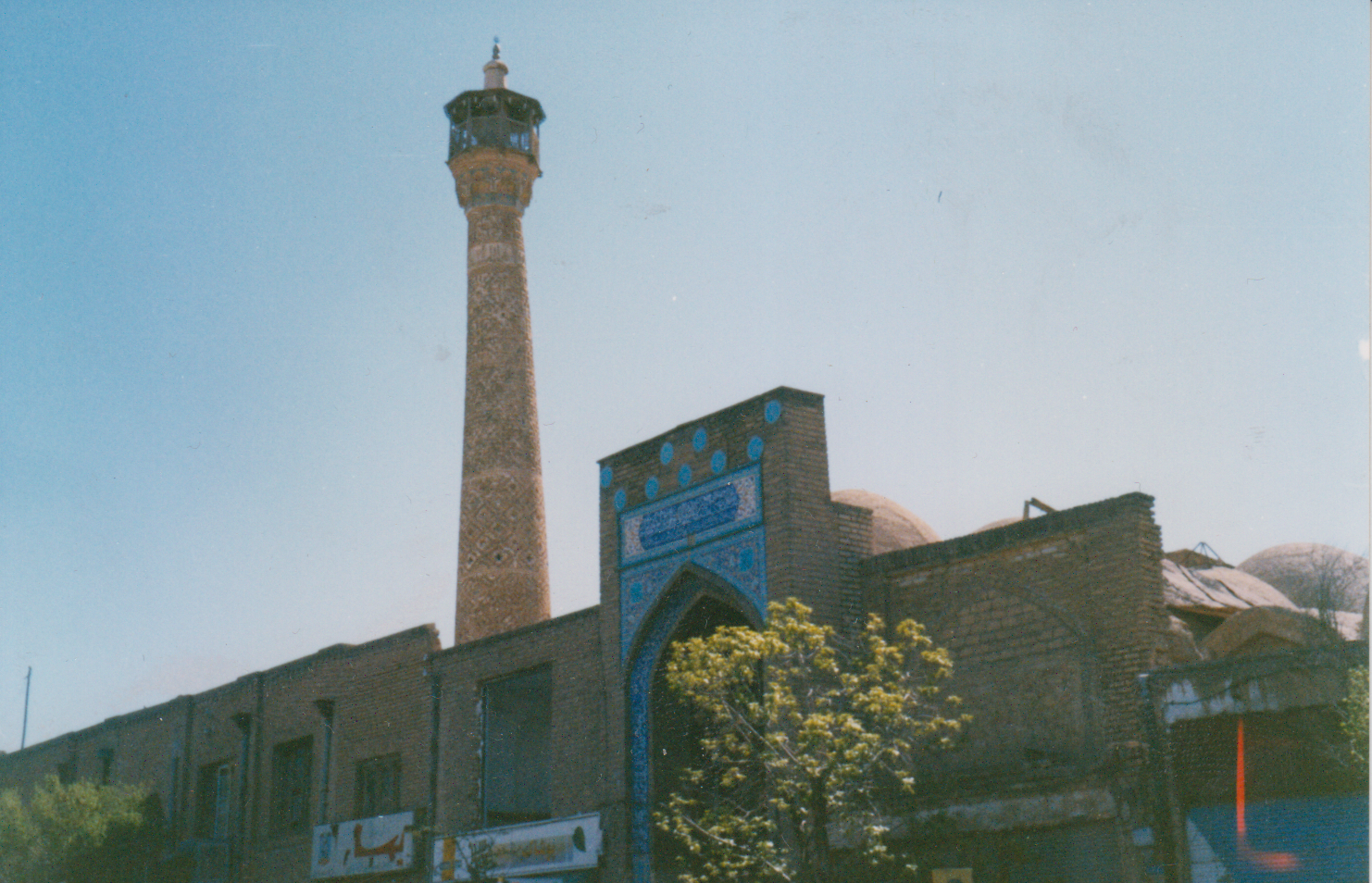 مسجد جامع سمنان، تاریخ عکس، نامعلوم، دهه 80 هجری شمسی